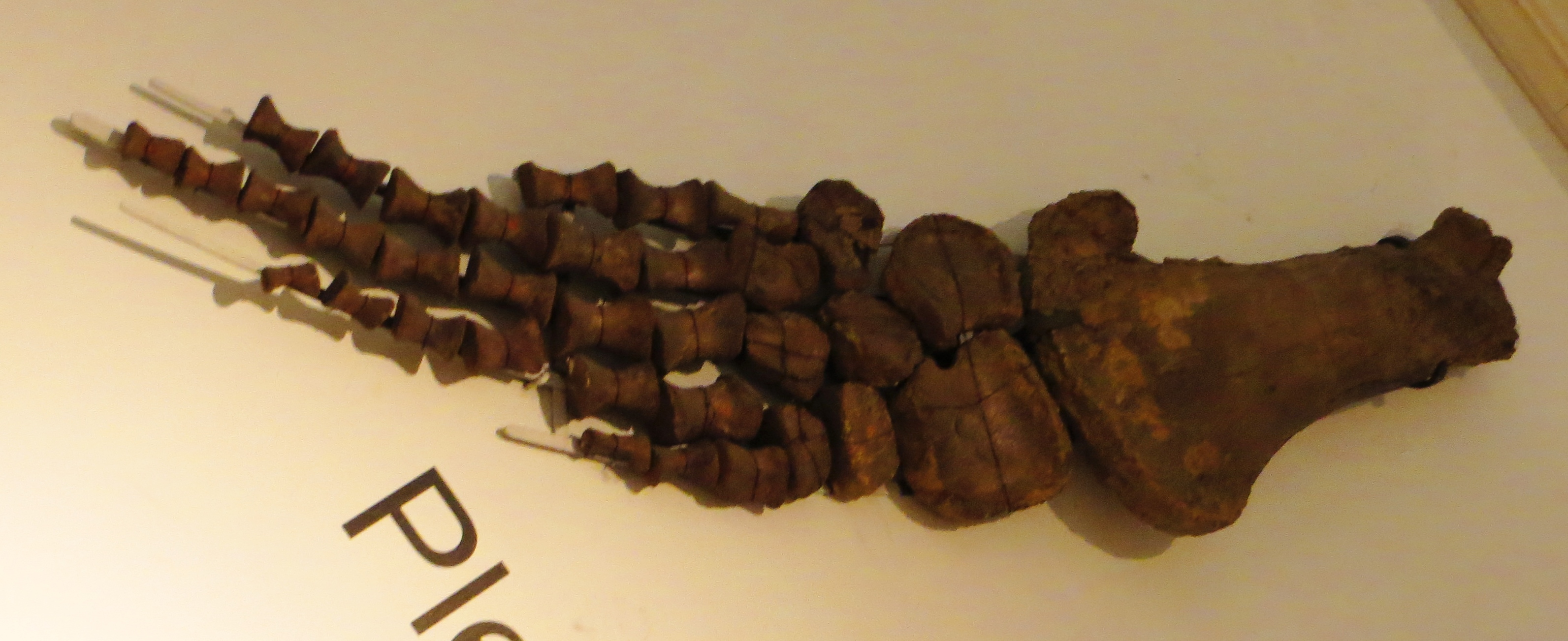 Fossil of Pliosaurus, an extinct reptile - Took the picture at Museum of Paleontology, Tuebingen